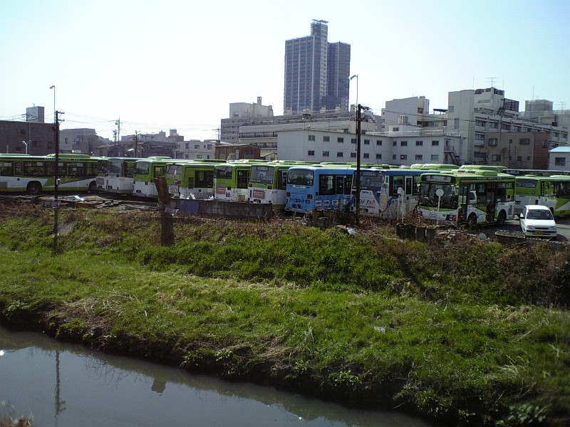 国際興業バスの旧川口営業所。バスの奥の白い建物が営業所の建物。